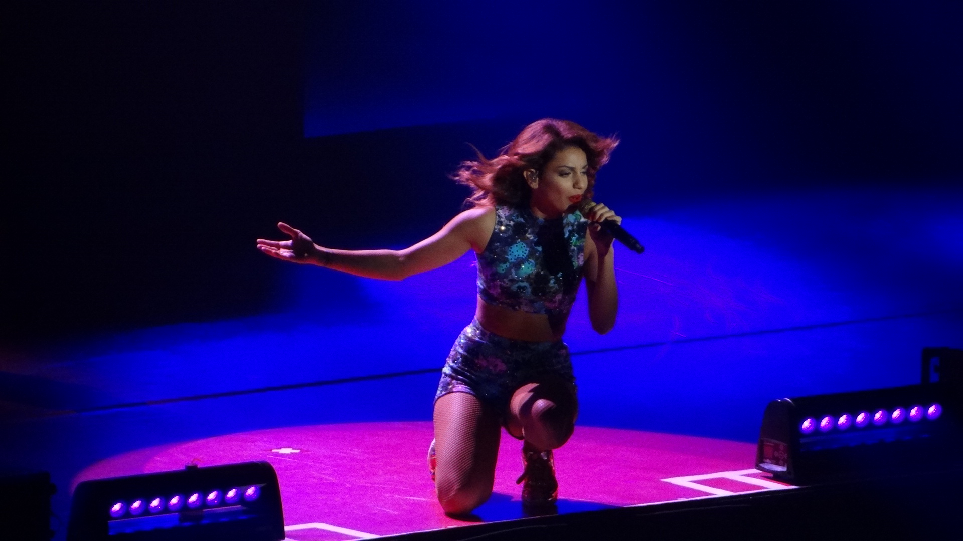 Tal en concert Lille Grand palais Novembre 2014